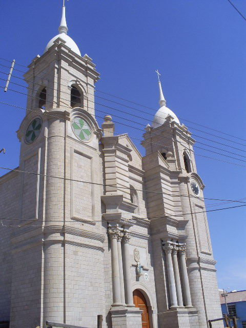 Cocatedral de la ciudad de Moquegua